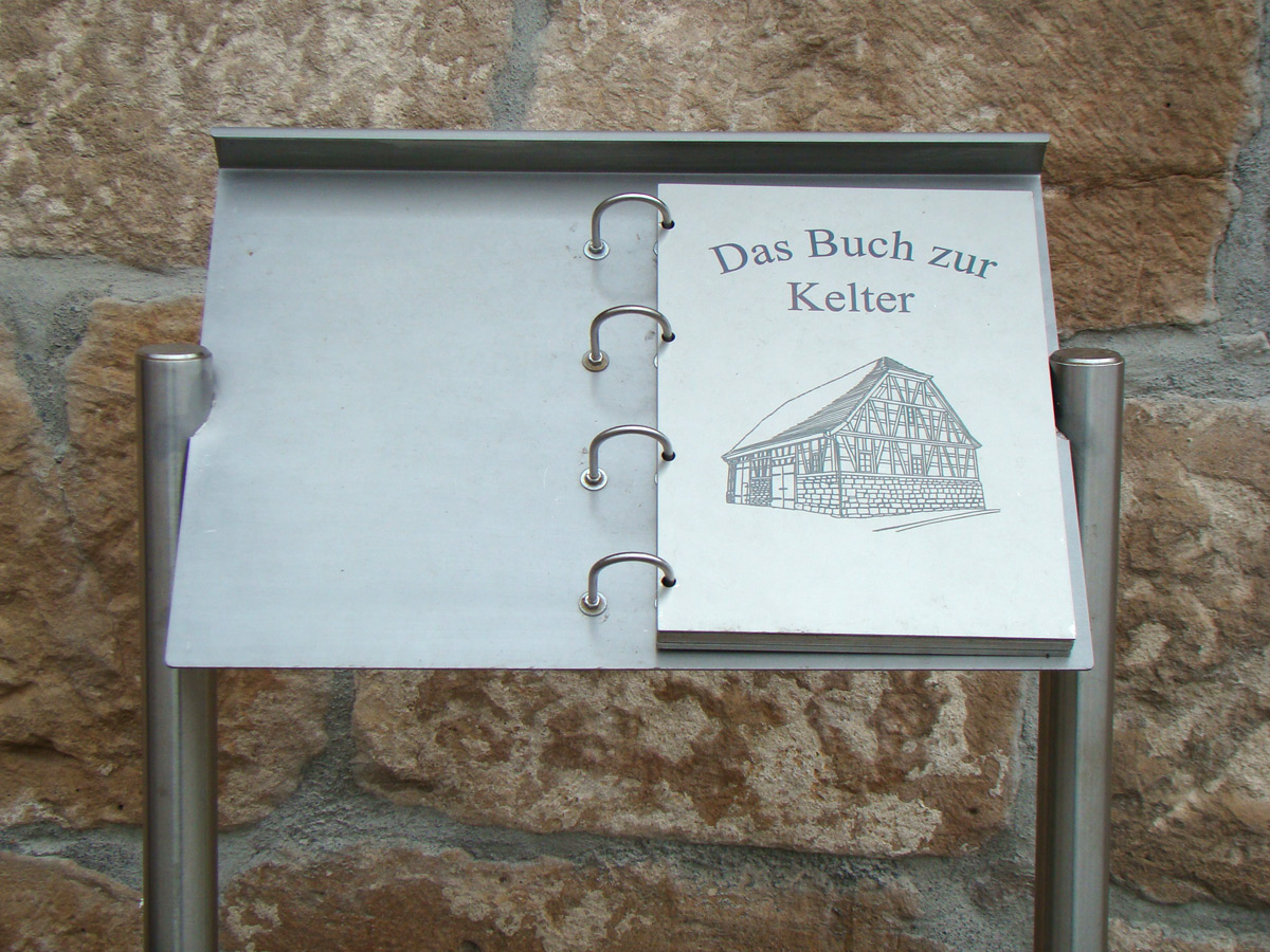 Das "Buch zur Kelter" an der Alten Kelter in Ilsfeld-Helfenberg, Denkmaldokumentation als Buch aus Edelstahl mit Lasergravuren.